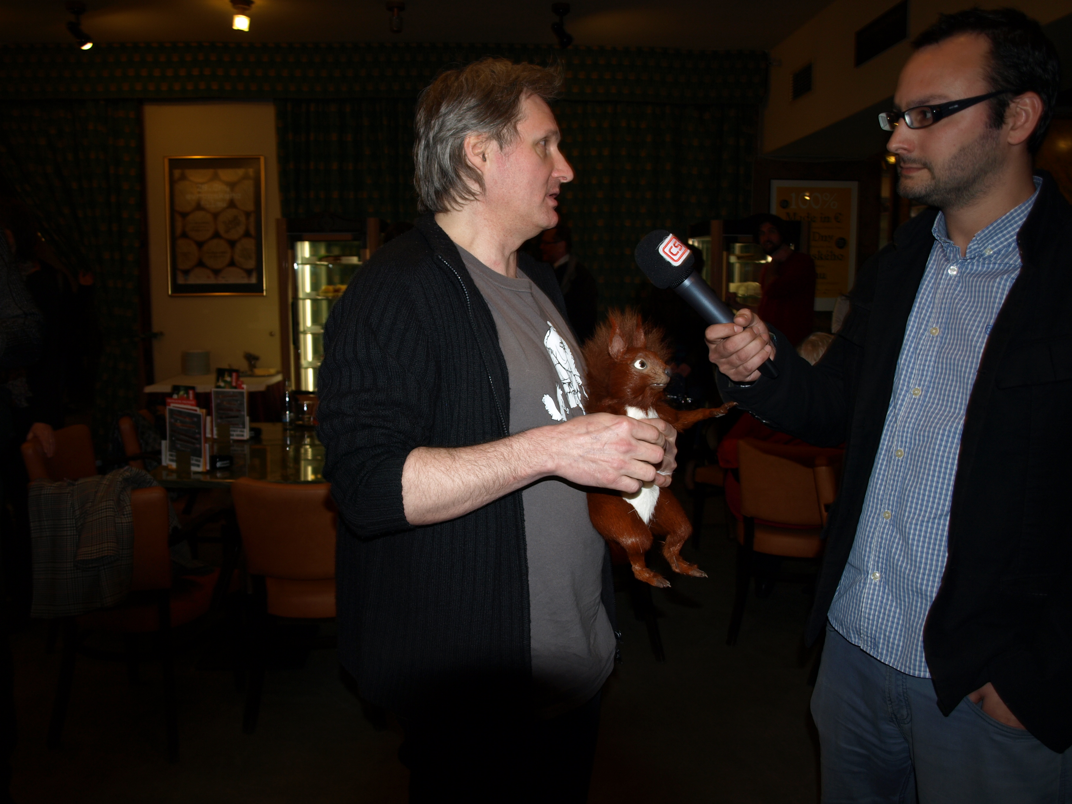 Fotky z novinářské projekce filmu Kovář z Podlesí